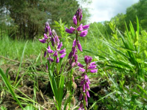 GNU-FDL